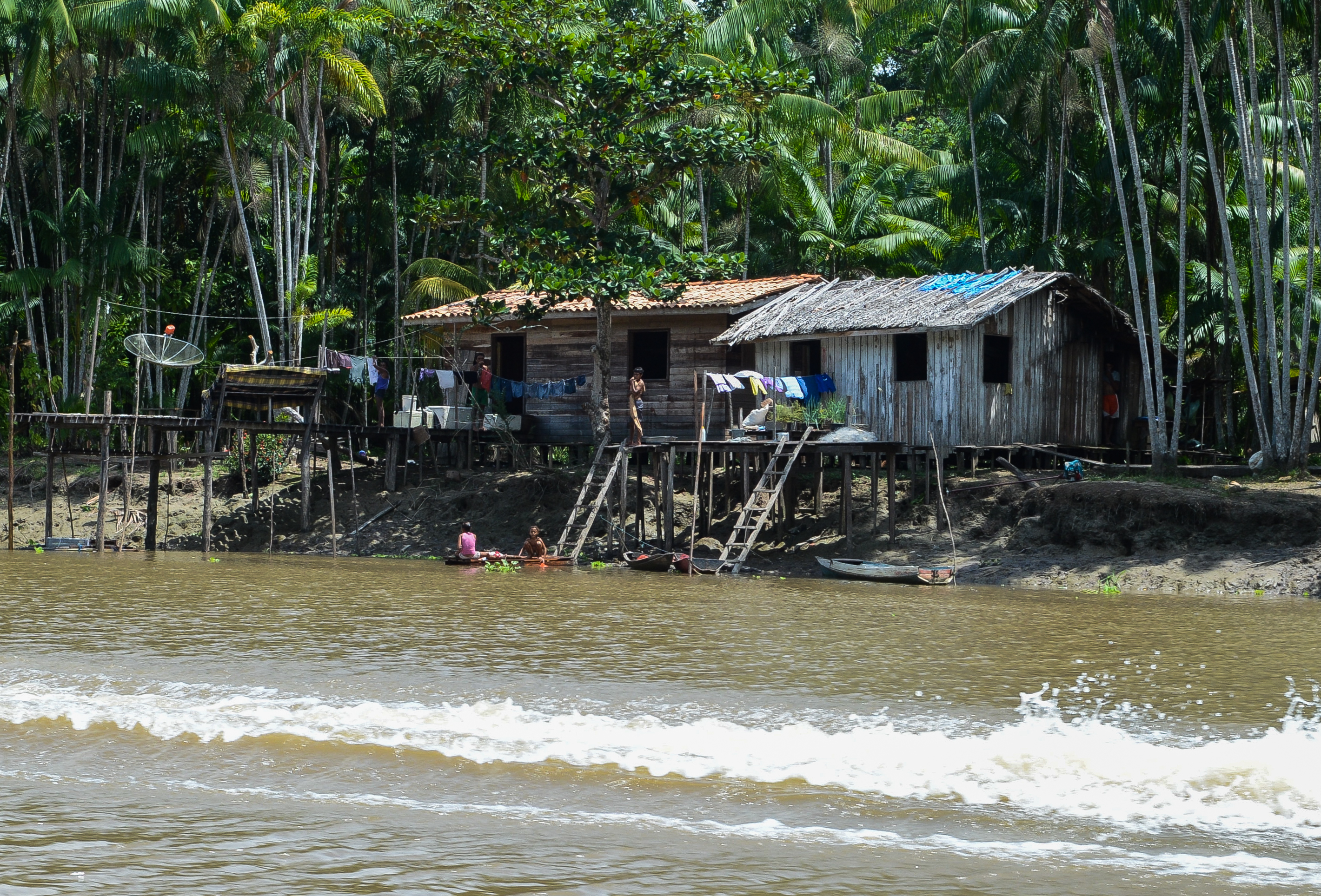 População ribeirinha no Pará. Foto: Antonio Cruz / Agência Brasil